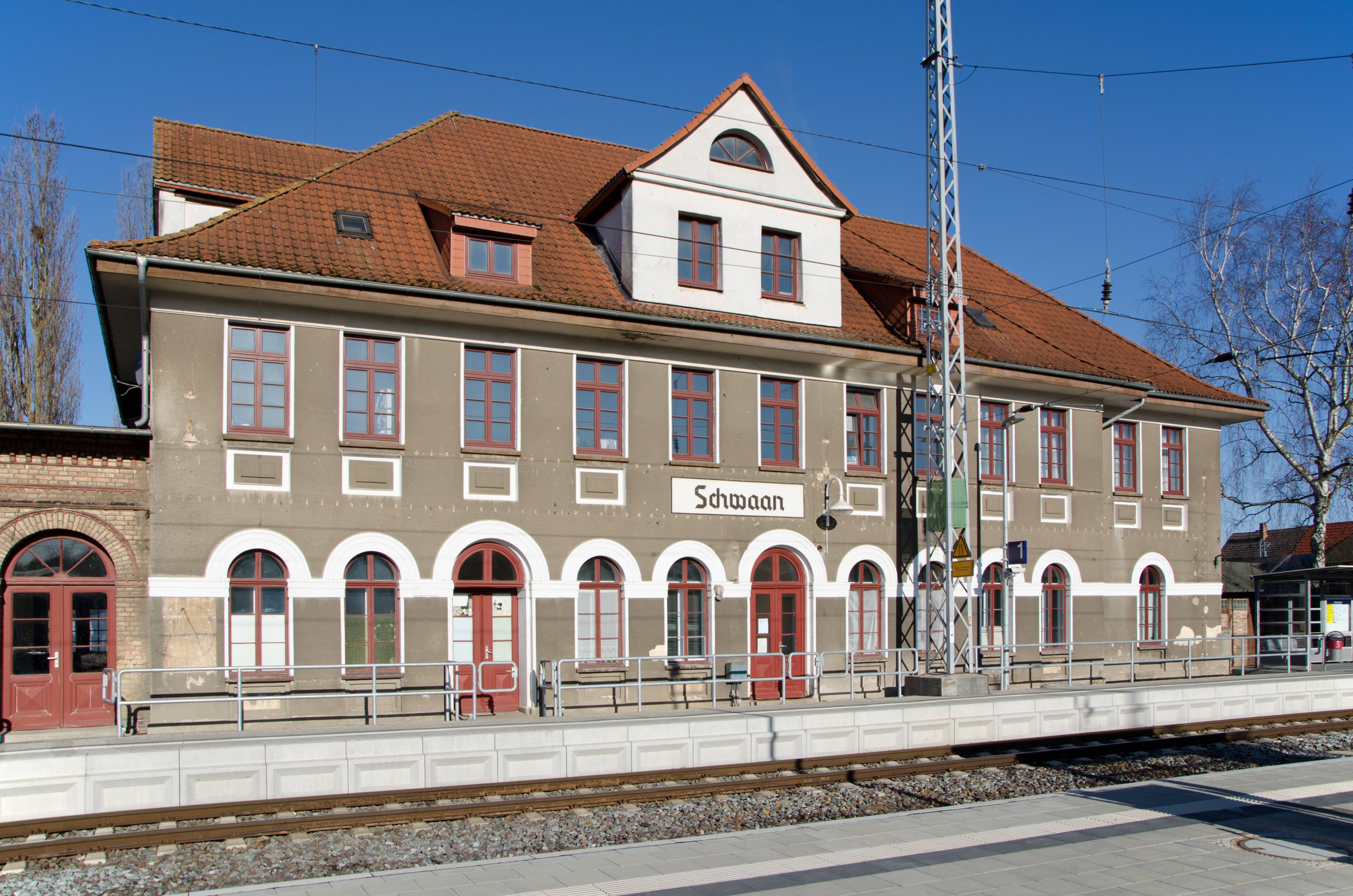 Bahnhofsgebäude von Schwaan